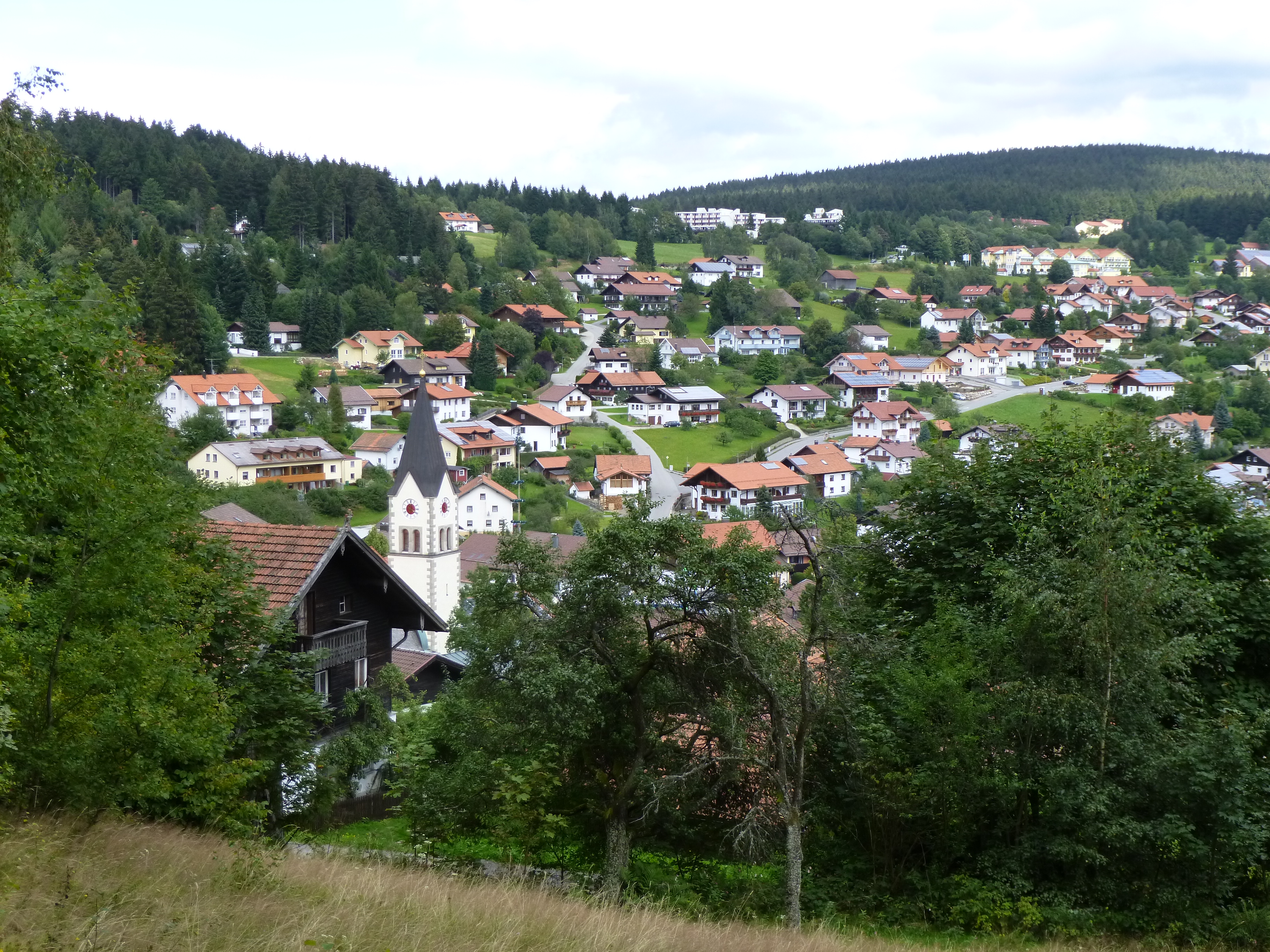 Blick vom Kapellenberg auf den Luftkurort Sankt Englmar. Im Hintergrund der Predigtstuhl.